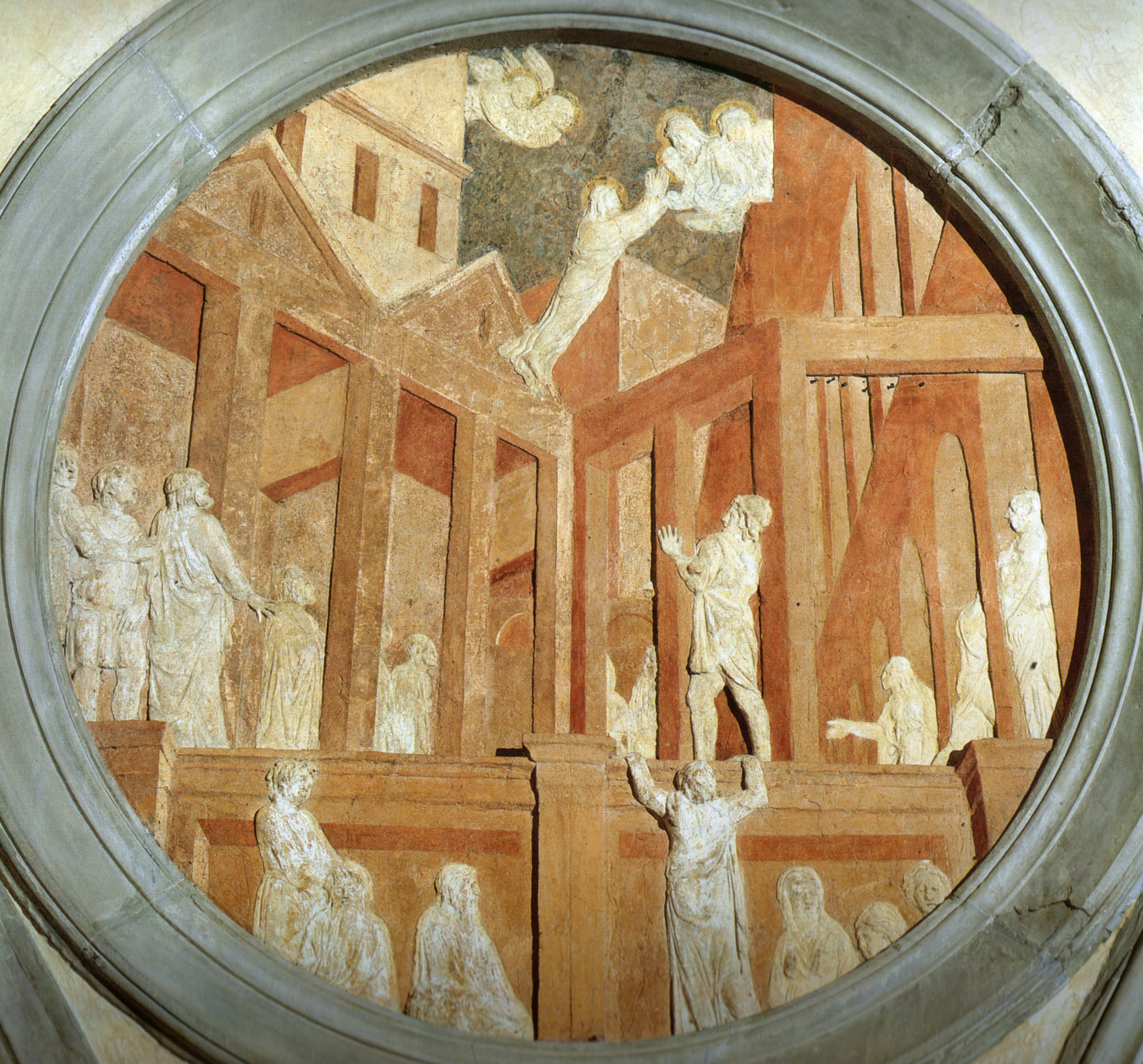 Donatello, storie di san giovanni evangelista, ascensione di s.g., 1434-43